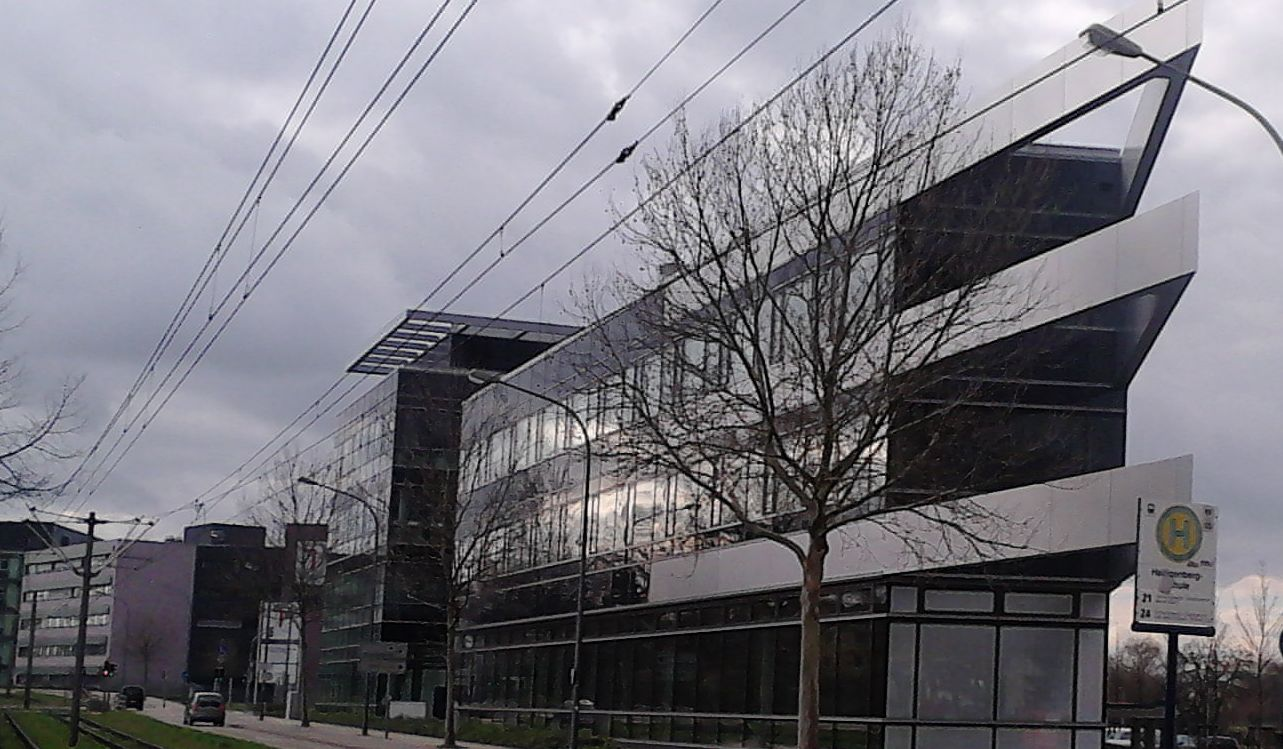 Gebäude der Octapharma Heidelberg, Technologiepark; von der Haltestelle Heiligenbergschule aus gesehen